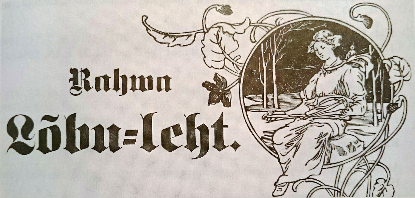 Rahva Lõbuleht, päismik